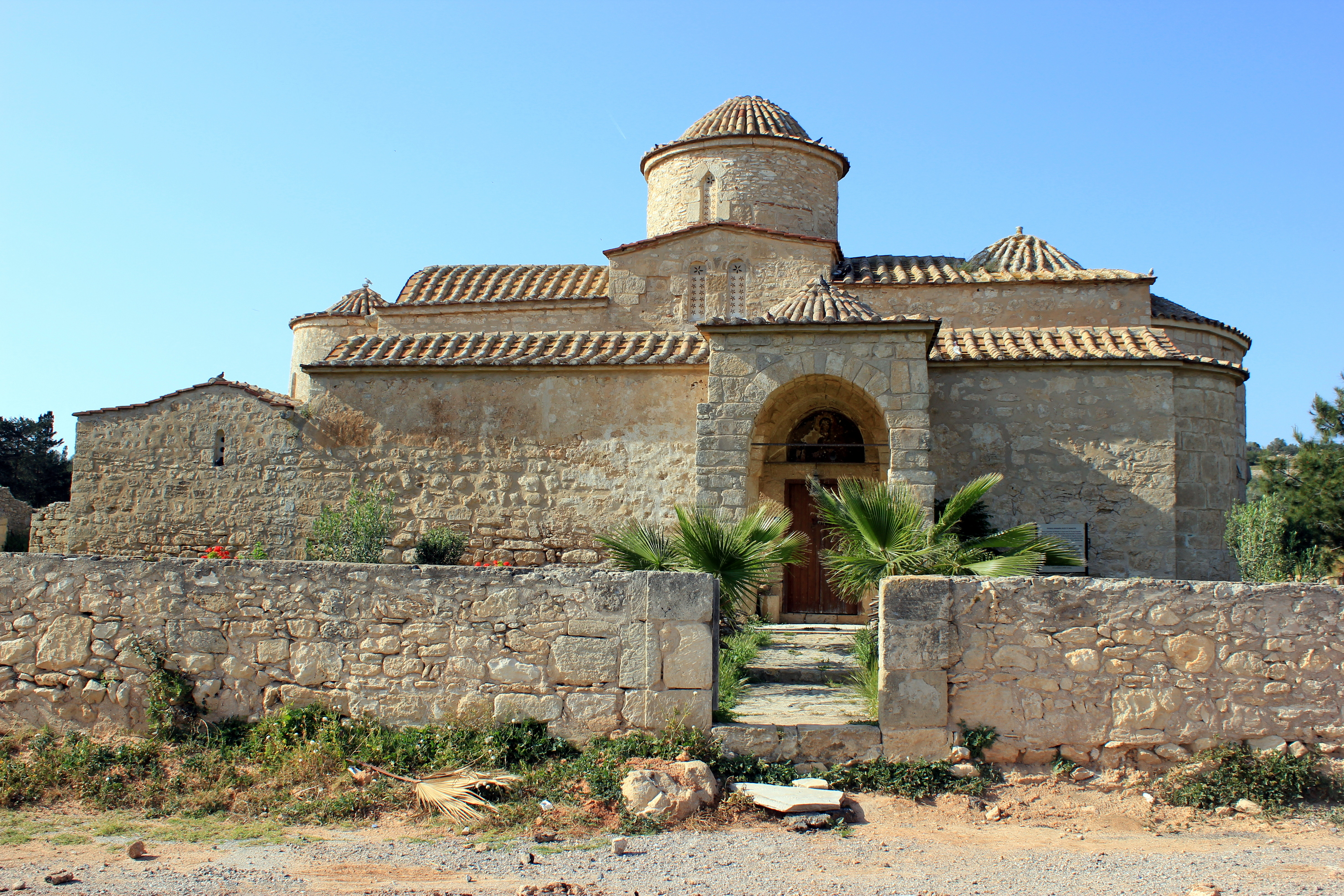 Die Panagia Kanakaria in Lythrangomi/Boltaşlı auf der Karpas-Halbinsel, Zypern.